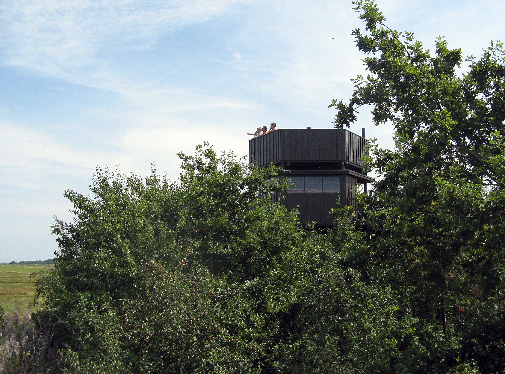 Fuglevænsfondens observationstårn på Nyord Enge ved Møn, Denmark